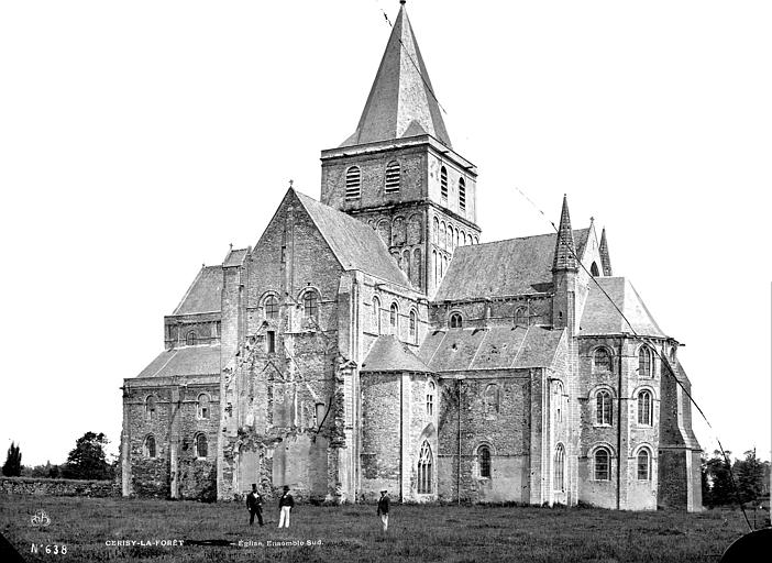 Église de l'abbaye de Cerisy-la-Forêt, vue d'ensemble par le Sud.